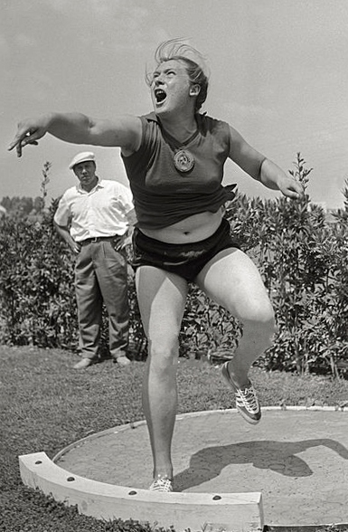 Tamara Press, Rome, 1960